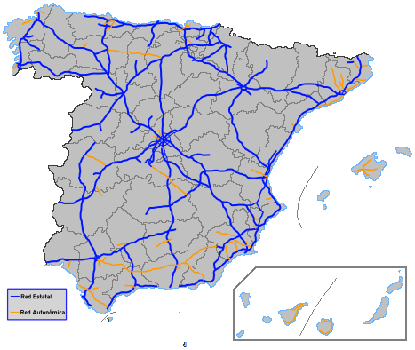 Red española de autopistas y autovías